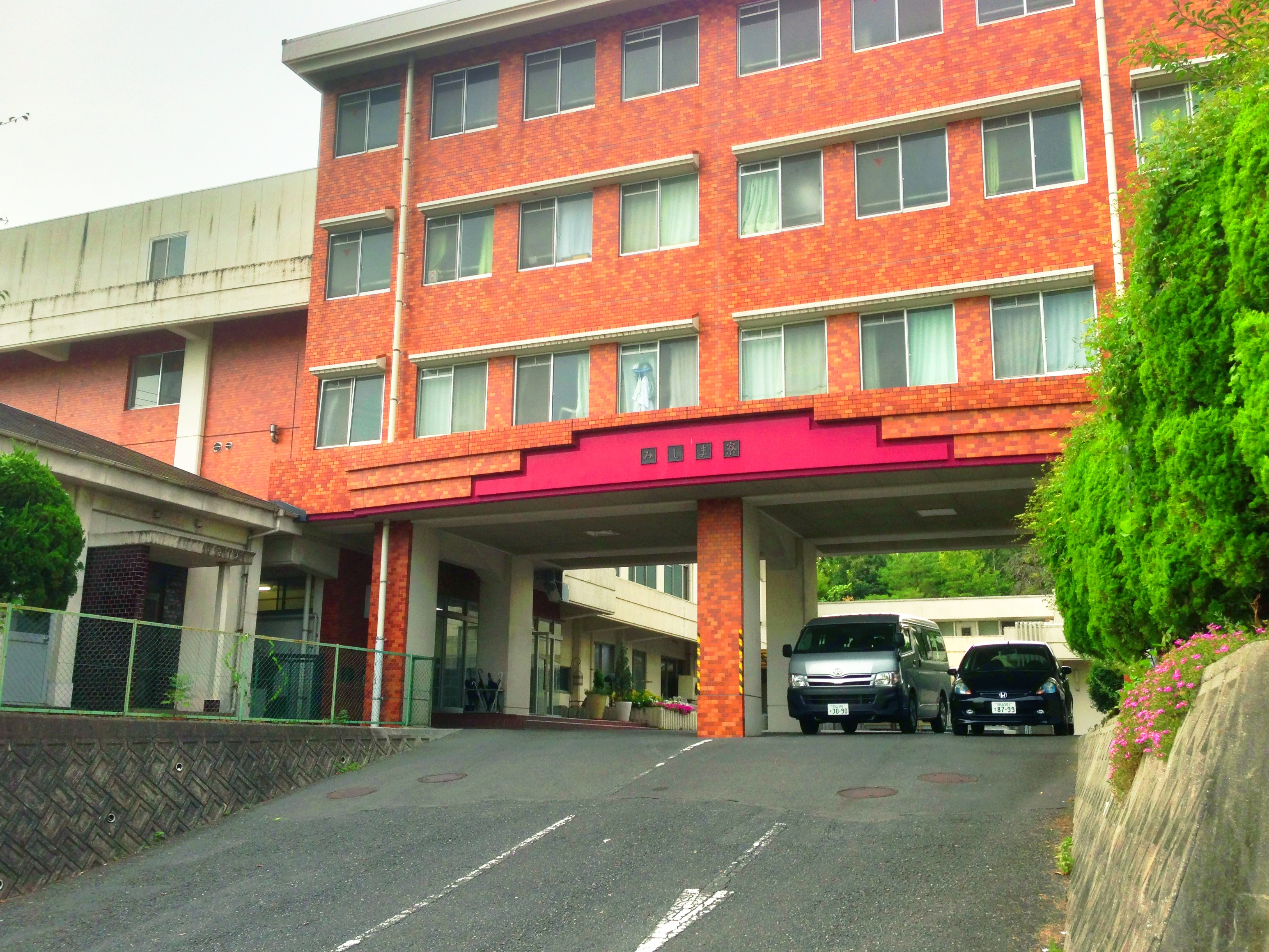 岡山中学校・高等学校の寮。中央部分は増築された部分。